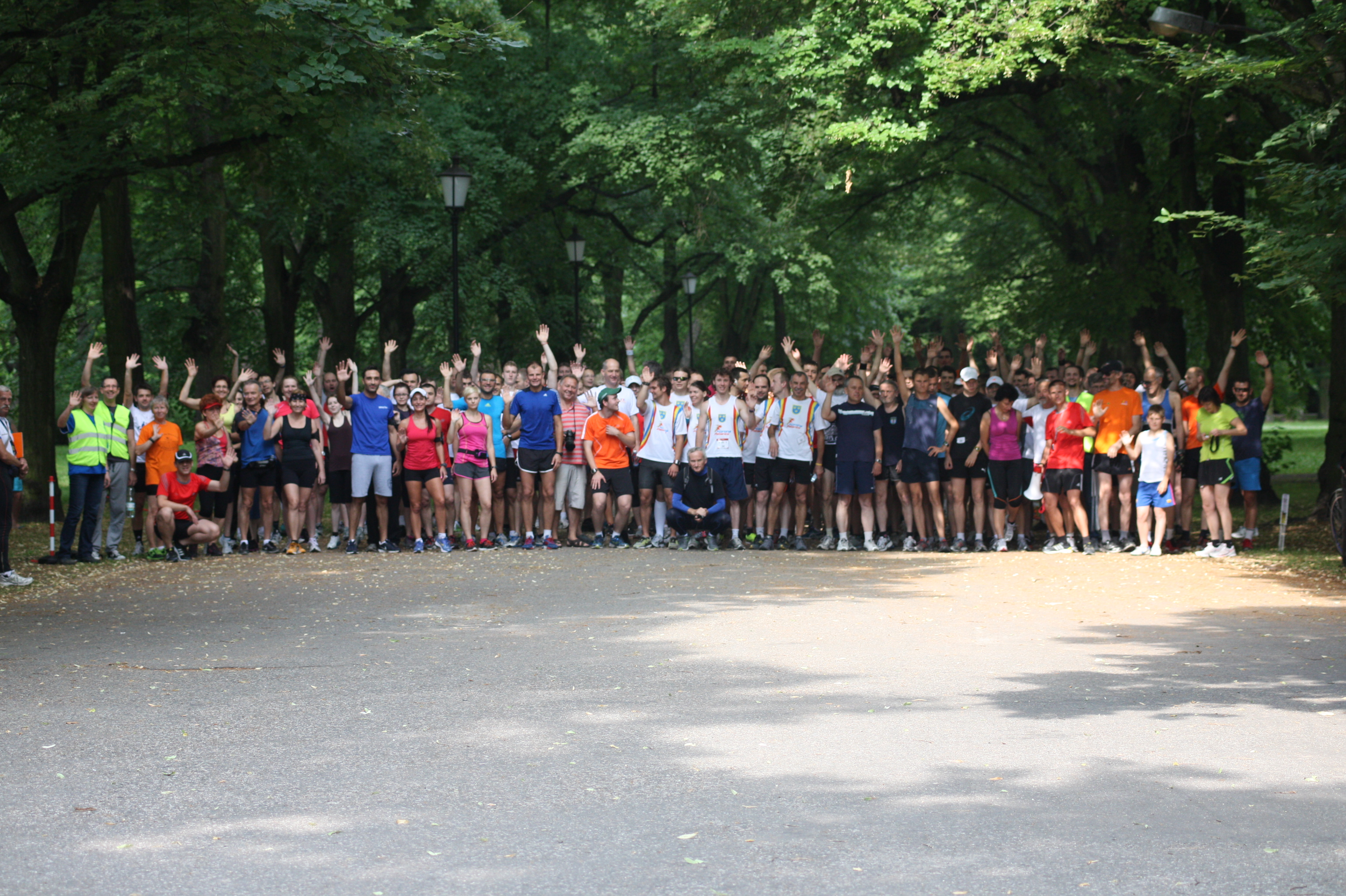 Start biegu parkrun Łódź w dniu 6 lipca 2013.